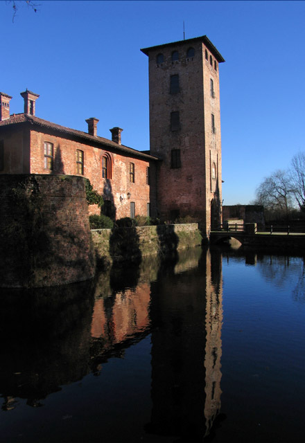 Castello di Peschiera Borromeo 01/2007